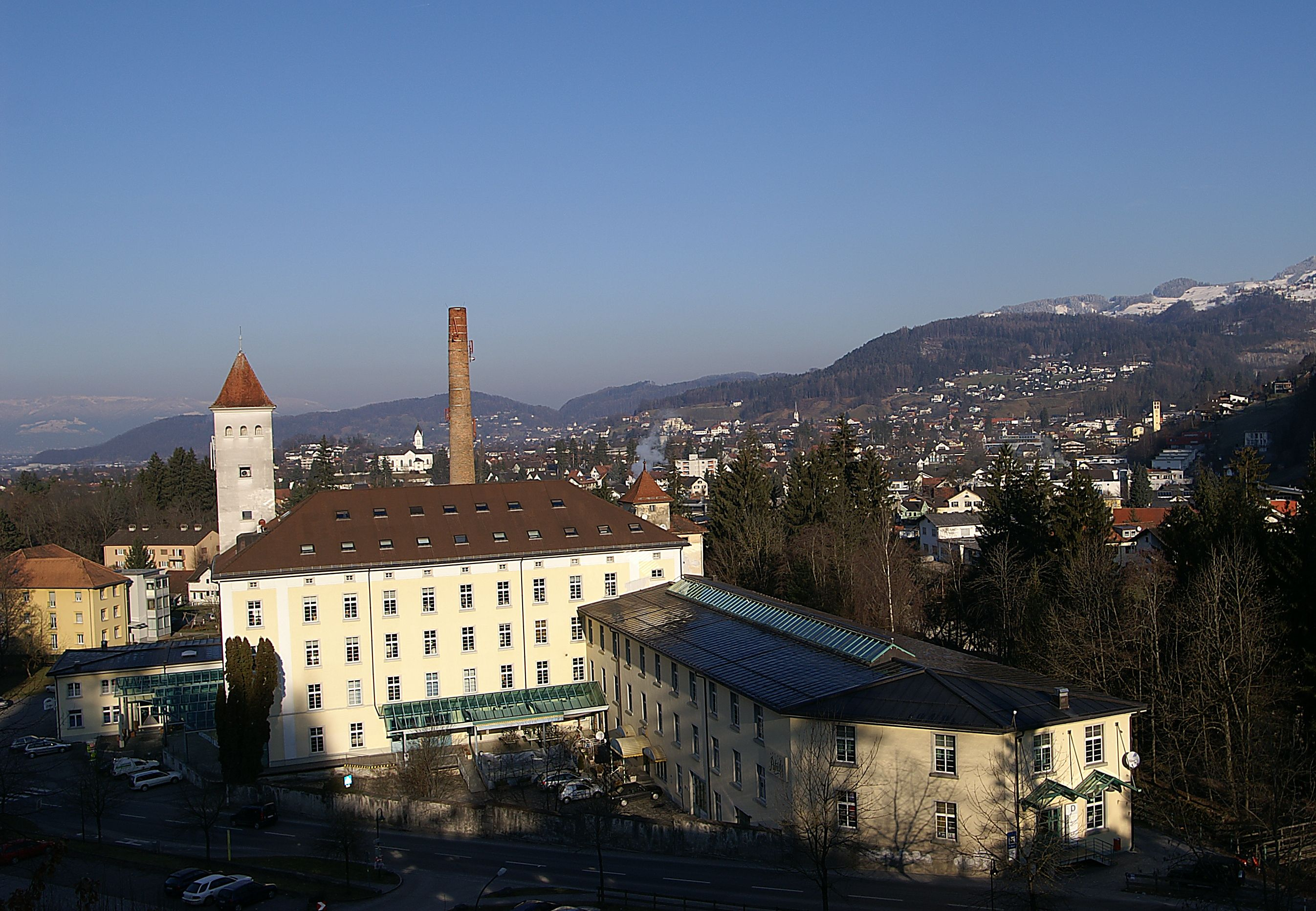 aus dem DEHIO Vorarlberg 1983: Alemannenstrasse, Nr.49: Spinnerei Franz M. Rhomberg, begonnen 1839, erweitert 1889, 1906; mit Wasserturm von 1910 (Heimbach und Schneider), zugehöriges Wohnhaus im Heimatstil (Nr.47).*** Heute Gewerberpark Rankweil. Siehe [1].